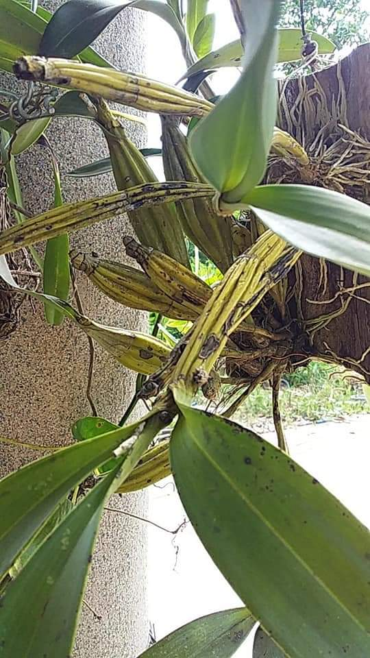 lan